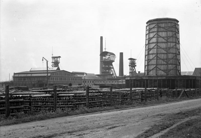 Die "Vereinigte Karsten-Zentrum-Grube" in Beuthen O/S. Obwohl die Stadt mit einem Kranz von Gruben und Industrieanlagen umgeben war, sah man zwischendurch bestellte Felder, blühende Gärten und weidende Ziegen, oft dicht an schwelenden Halden. Gern pachteten die Bergleute Acker- und Gartenland, auf dem sie Kraut und Kartoffeln zogen, auf dem ihre Ziege, die "Bergmannskuh" genannt, Nahrung fand und auf dem man selbst nach der Schicht und am Sonntag Erholung suchte. Oft zog der Bergmann auch ein Schwein. Es ging doch nichts über das "Hausschlachten" - ein Fest, das meist sogar ein Nachbarschaftsfest wurde, da der Kumpel die Kameratschaft über alles setzte. Die "Vereinigte Karsten-Zentrum-Grube" im Bild zeigt eine Fülle ordnungsgemäß gestapelter "Stempel", die laufend zur Abstützung des Gehänges vor Ort gebraucht wurden.